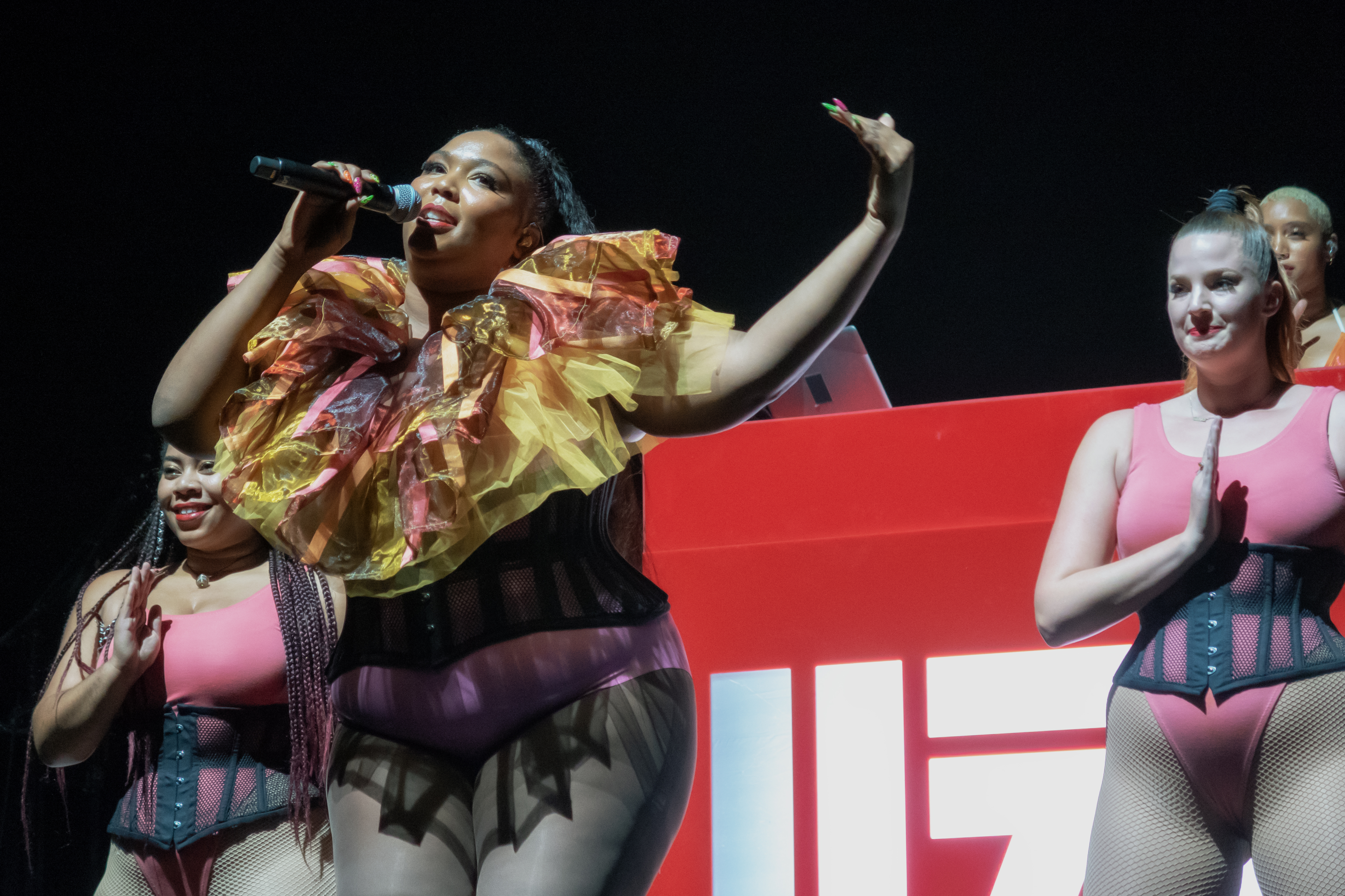 Lizzo